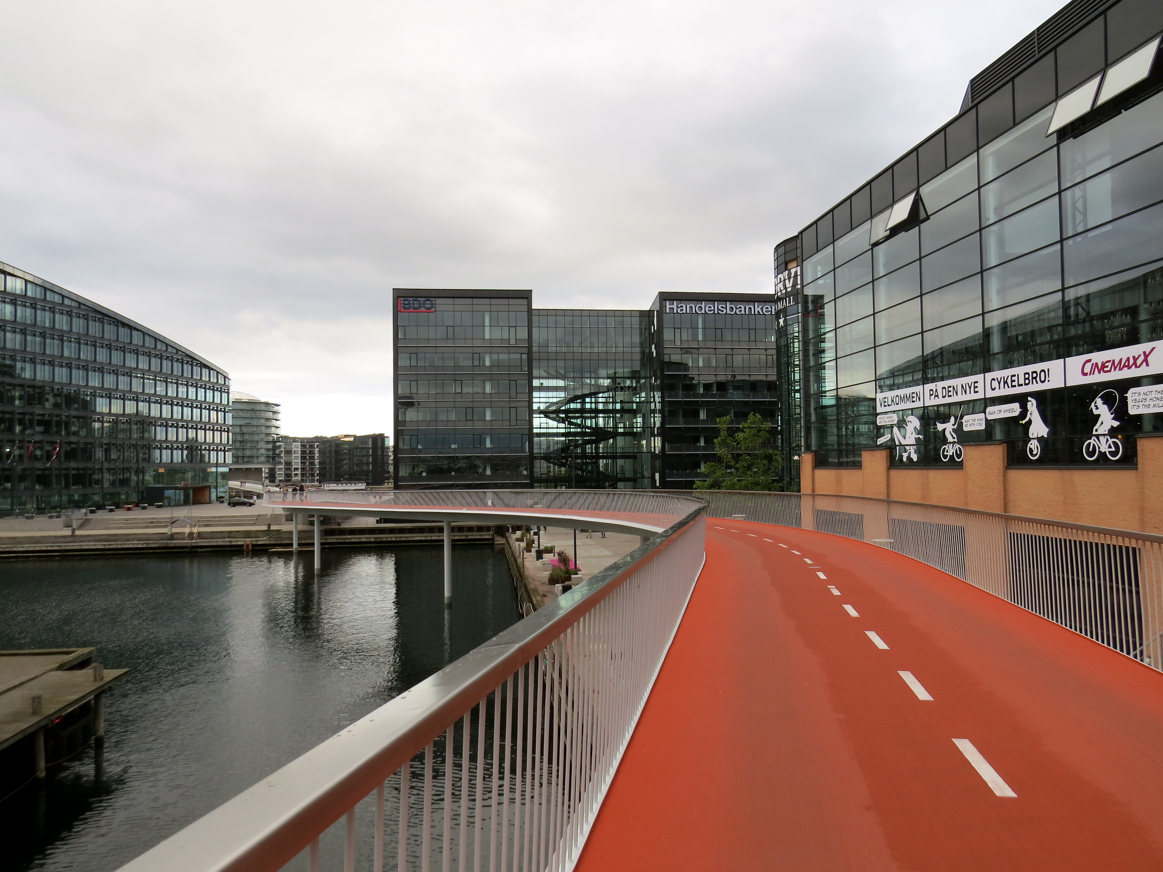 Cykelslangen ved Dybbøls Bro, Vesterbro, København